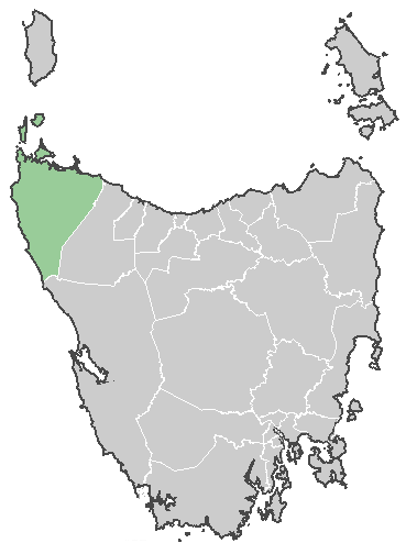 Carte de Circular Head, Tasmanie, Australie